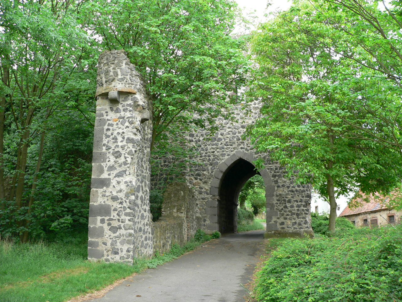 Spätgotisches Vortor im Hirschgarten der Burg Münzenberg in Hessen, Germany